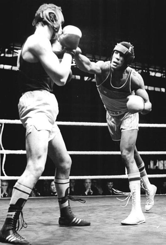 Michael Ernsz, Felix Savon ADN-ZB Lehmann 19.3.87 Halle: XVI. Vorschau Chemiepokal im Boxen (24. - 29.3.87)-Der kubanische Boxverband entsendet eine komplette Staffel mit durchweg international renommierten Akteuren. Drei Weltmeister werden durch die Ringseile klettern. Doch er, der 19jährige, 1,92 m große Schwergewichtler Felix Savon -Foto vom Pokal-Finale 1985, 5:0-Punktsieg über Michael Ernsz-DDR-links), schwingt sich zur Freude der Zuschauer vor dem Kampf gewandt über die Seile.